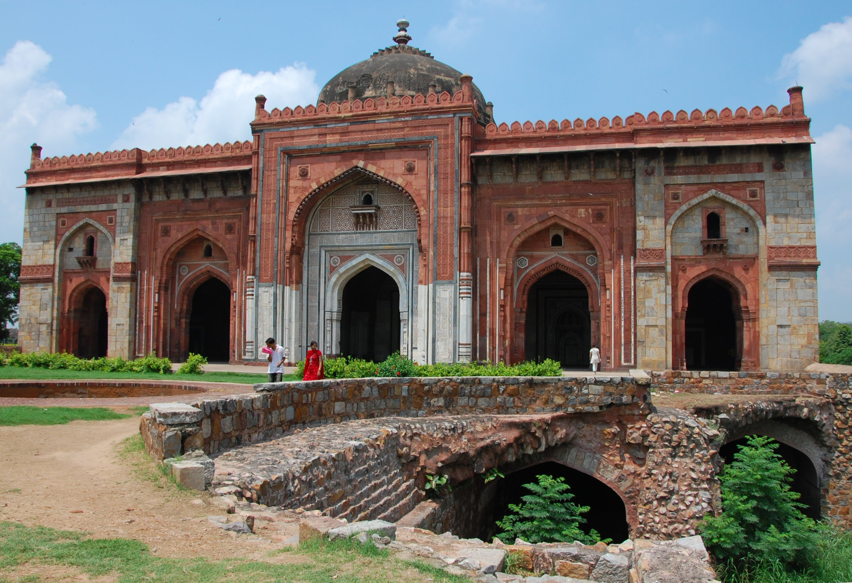 Qila Kuhna Masjid inside Purana Qila (Old Fort) in Delhi, India